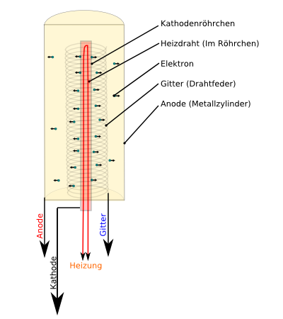 Realer Aufbau einer Elektronenröhre (Hier: Eine Triode)